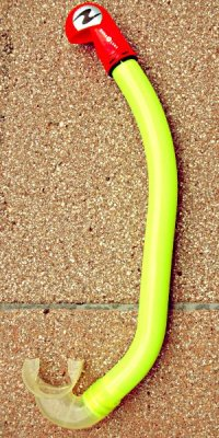 Ein Schnorchel ist Teil der Taucherausrüstung